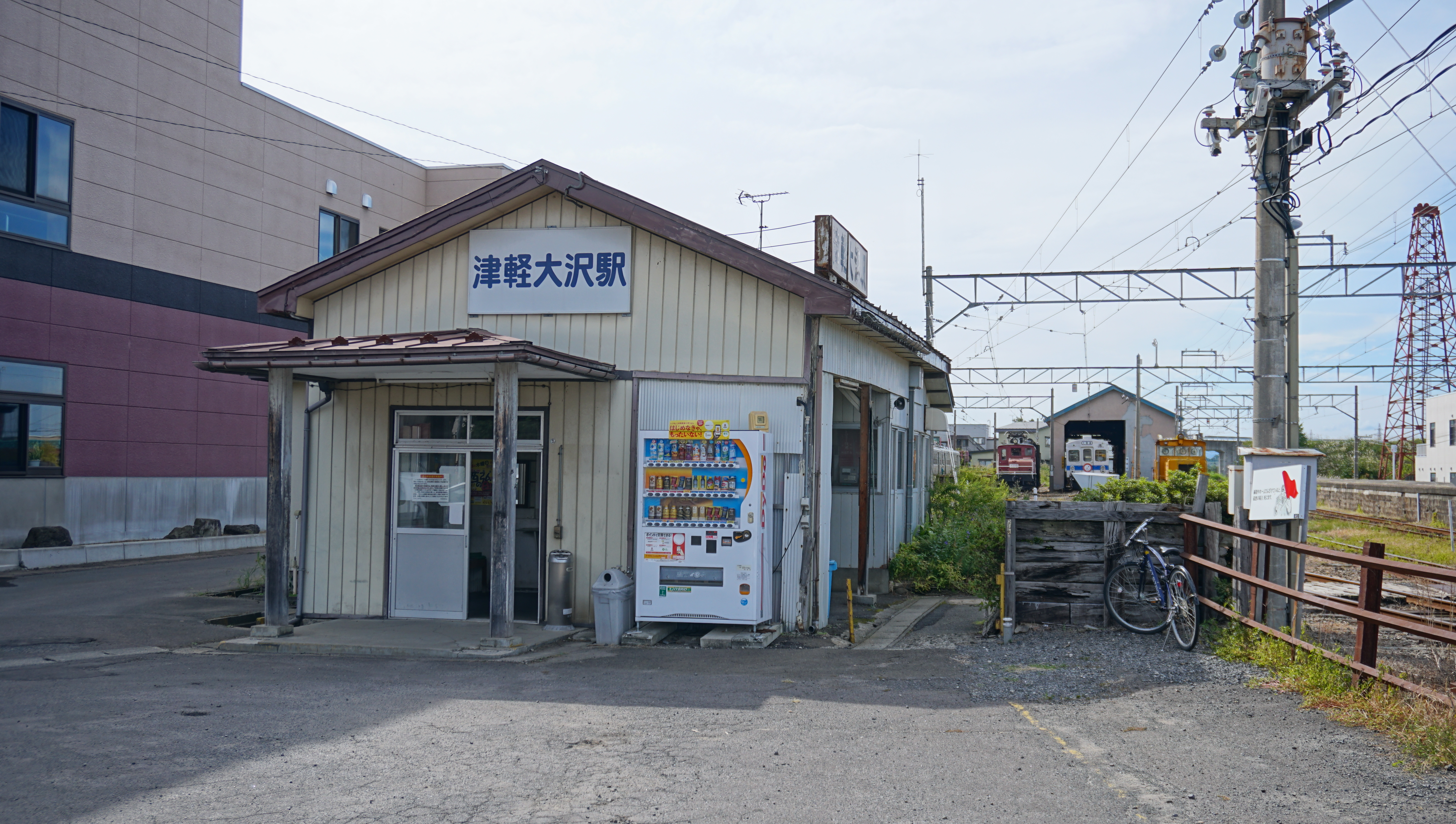 弘南鉄道大鰐線 津軽大沢駅